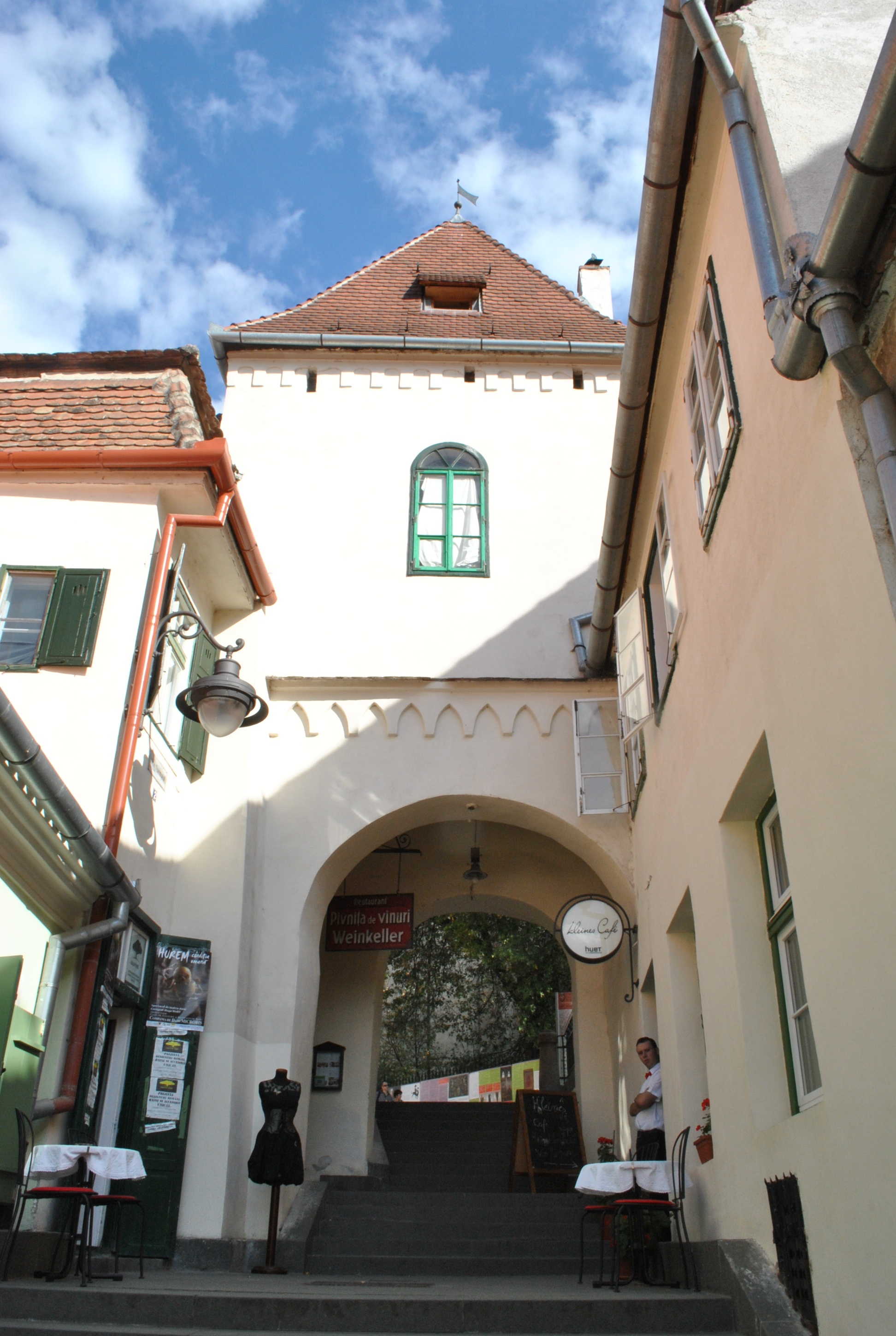 Incinta I: Turnul Scărilor, curtine (fragmente), 1191 - 1224 01